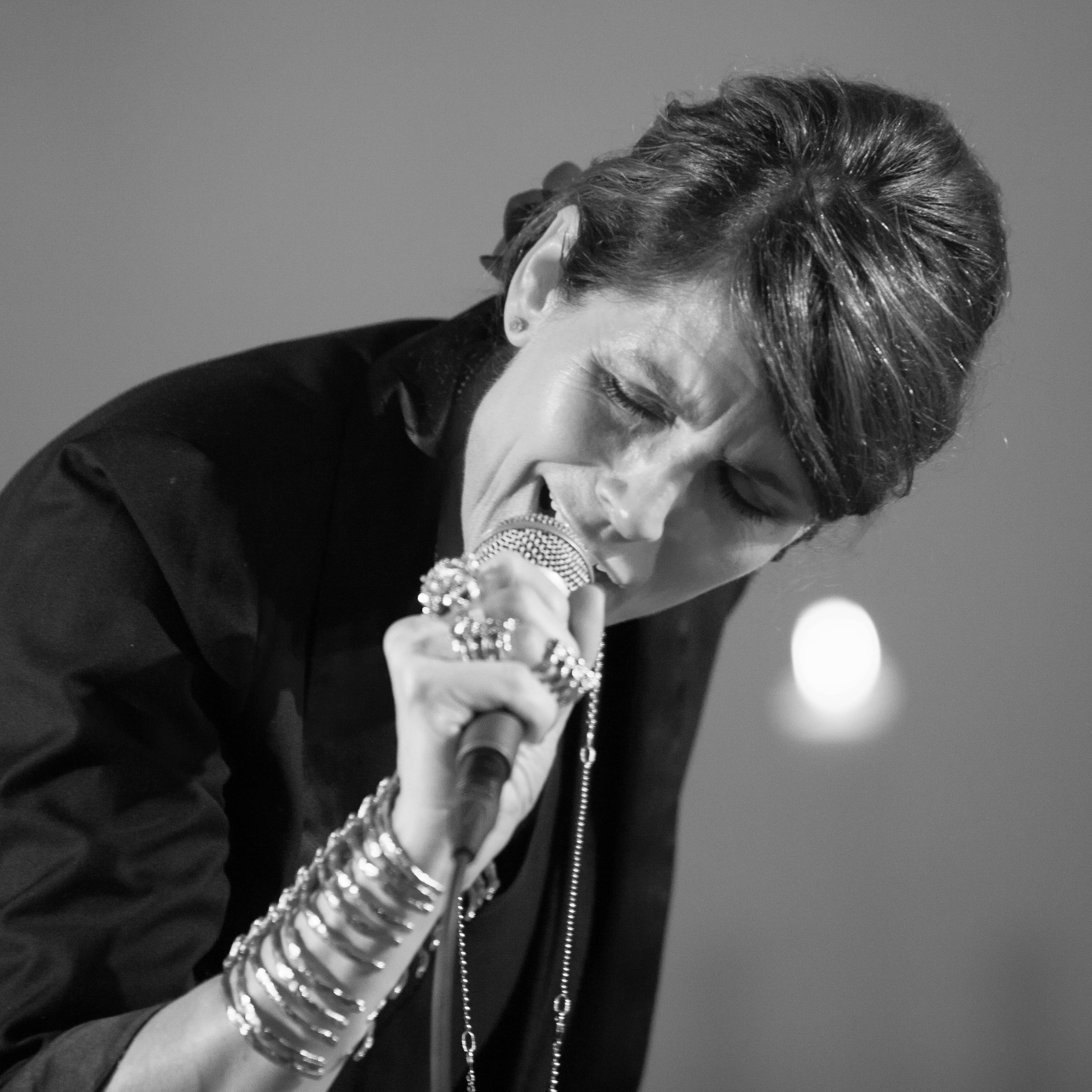 Kari Bremnes opptrer i Hunstad Kirke i 20. oktober 2013